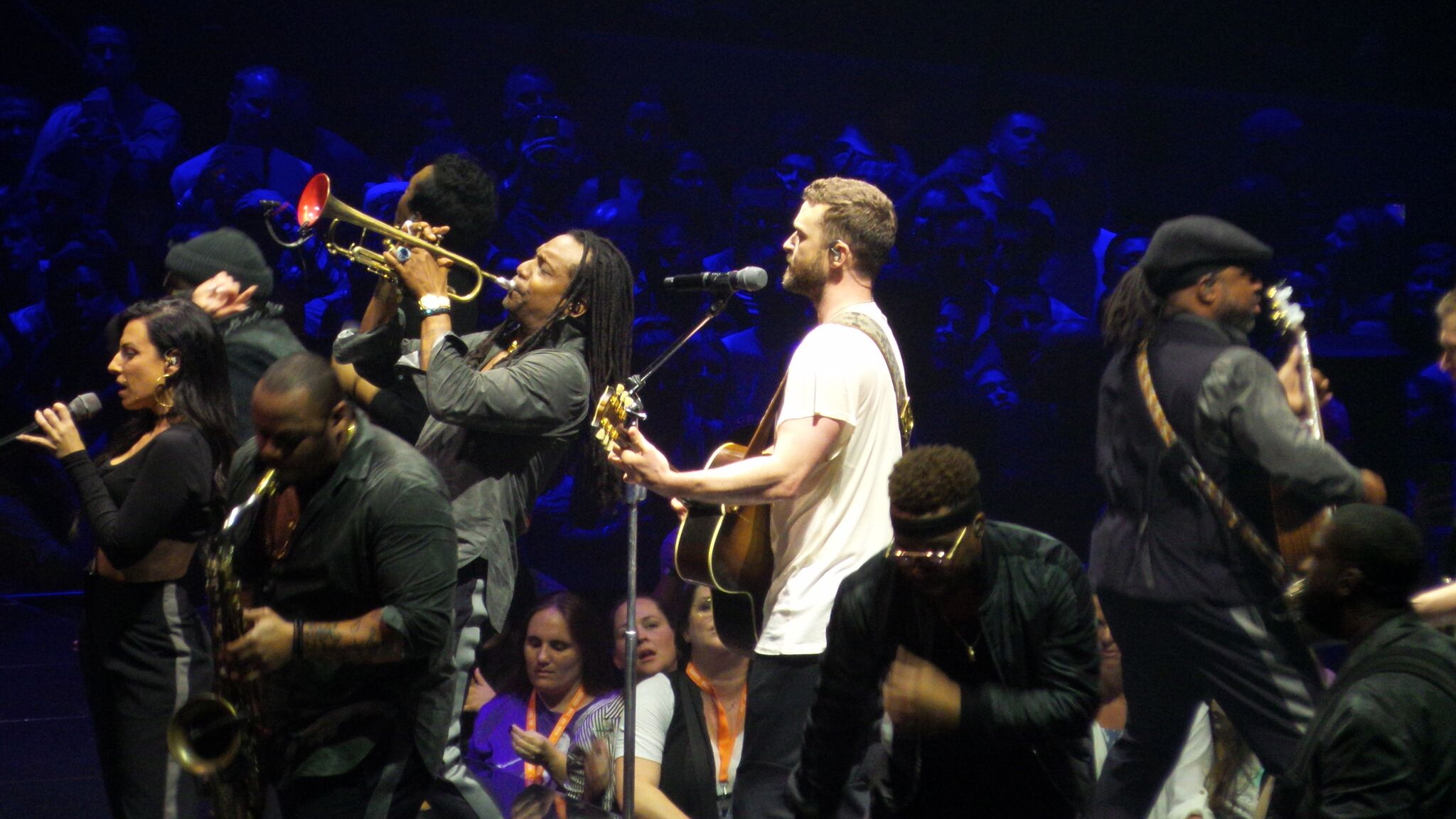 Justin Timberlake en un concierto de su gira Man of the Woods Tour en la ciudad de Miami el 18 de mayo de 2018.